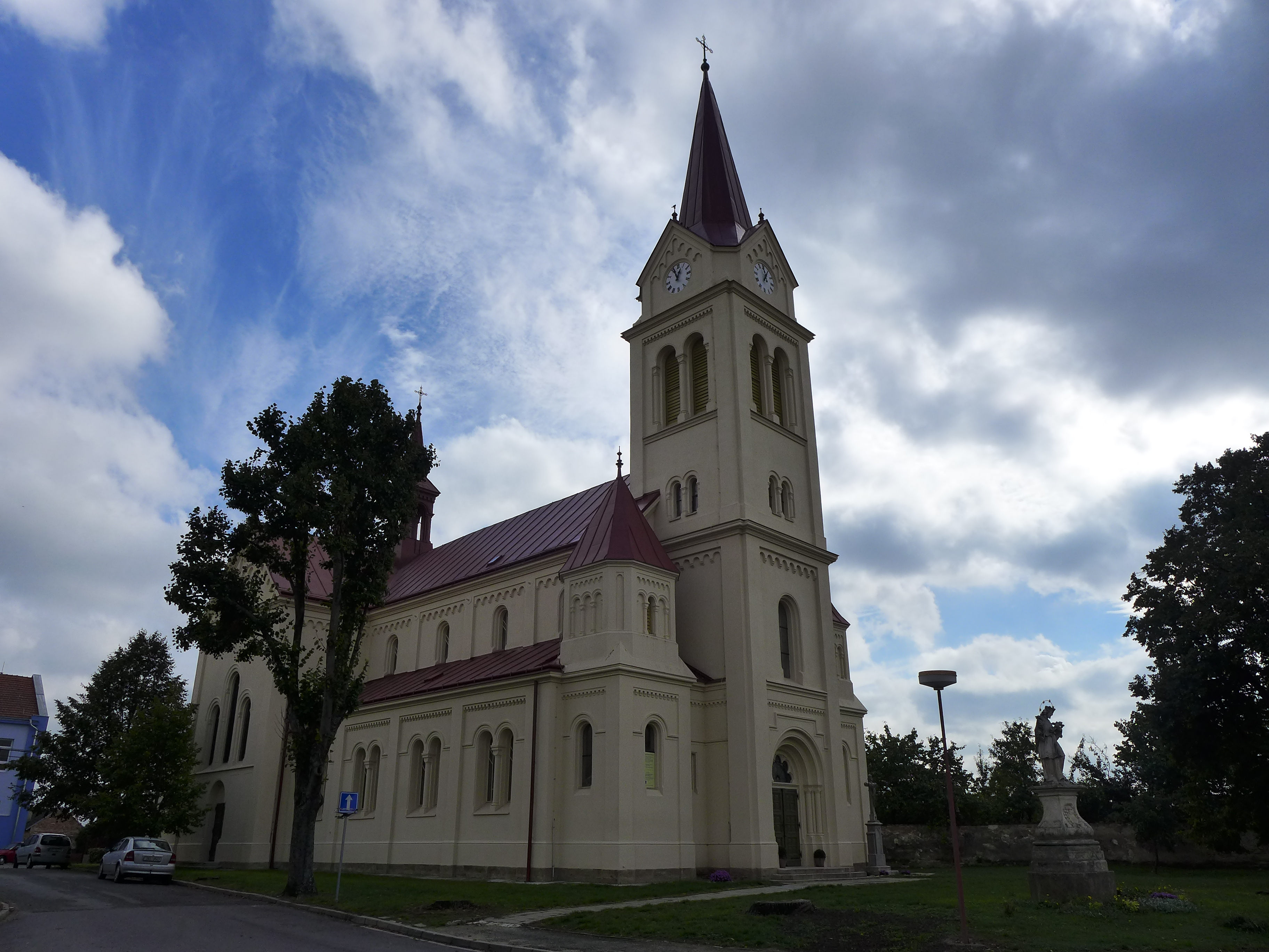 Kostel svaté Anny, st. 109, Jiřice u Miroslavi.